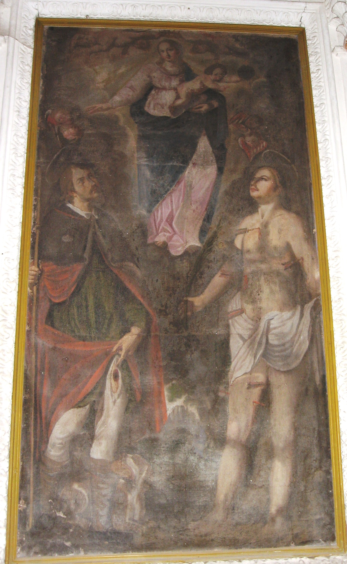 Pezzolo Valle Uzzone. Gorrino. Parrocchiale. Cappella di sinistra. La Vergine con i santi Rocco e Sebastiano.Pres.te XVIII secolo.